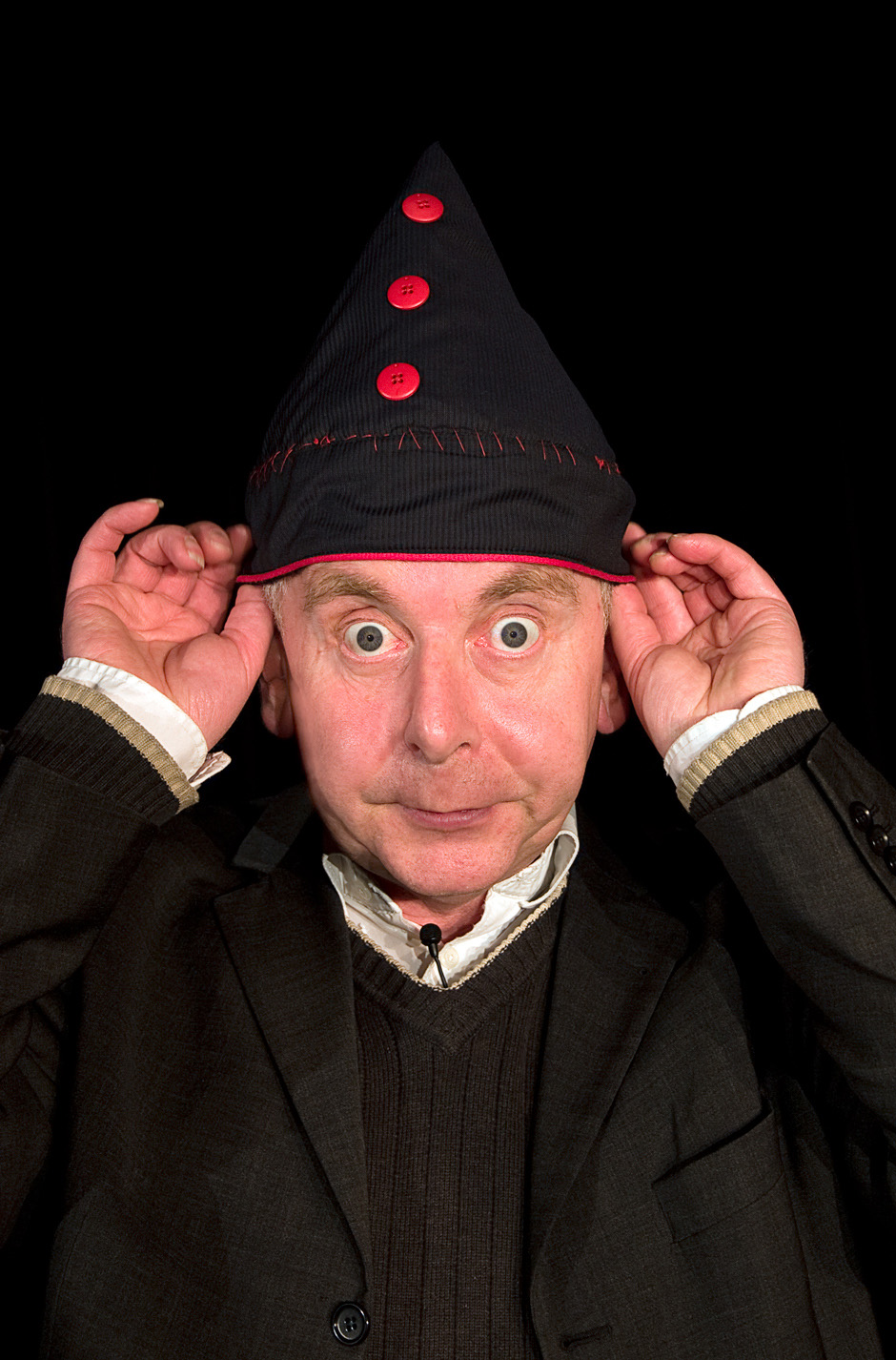 Erwin Grosche (* 25. November 1955 in Anröchte, Kreis Soest), deutscher Kabarettist, Schauspieler, Autor und Filmemacher aus Paderborn. Fotografiert im Fresche Keller, Ortenberg.